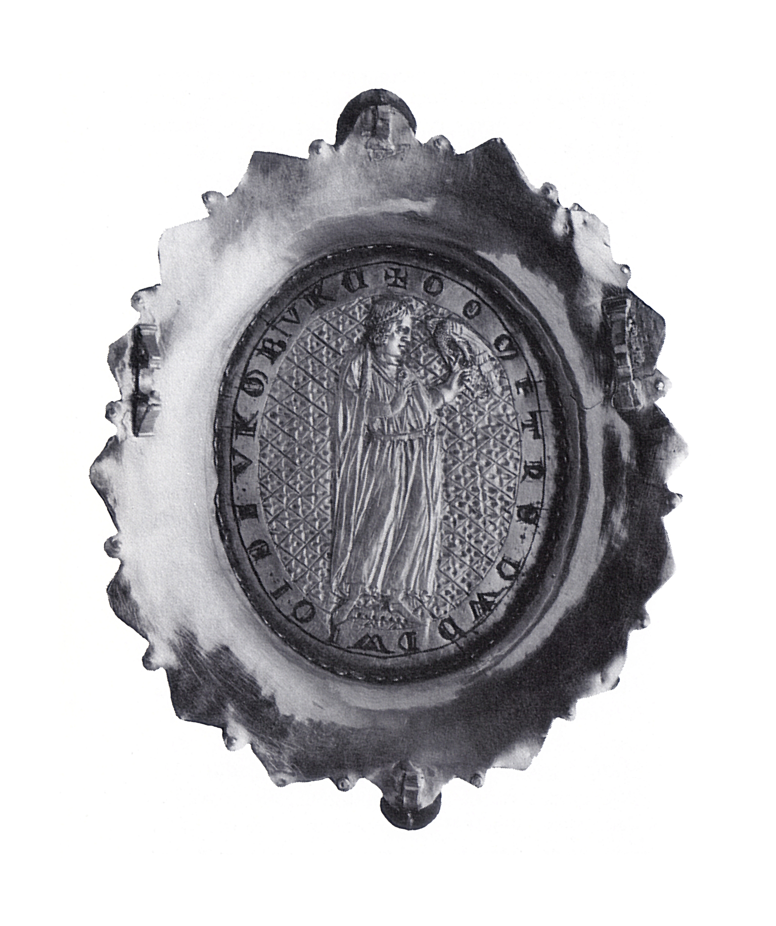 Schaffhausen, Museum zu Allerheiligen, Schatzkammer Onyx von Schaffhausen, revers